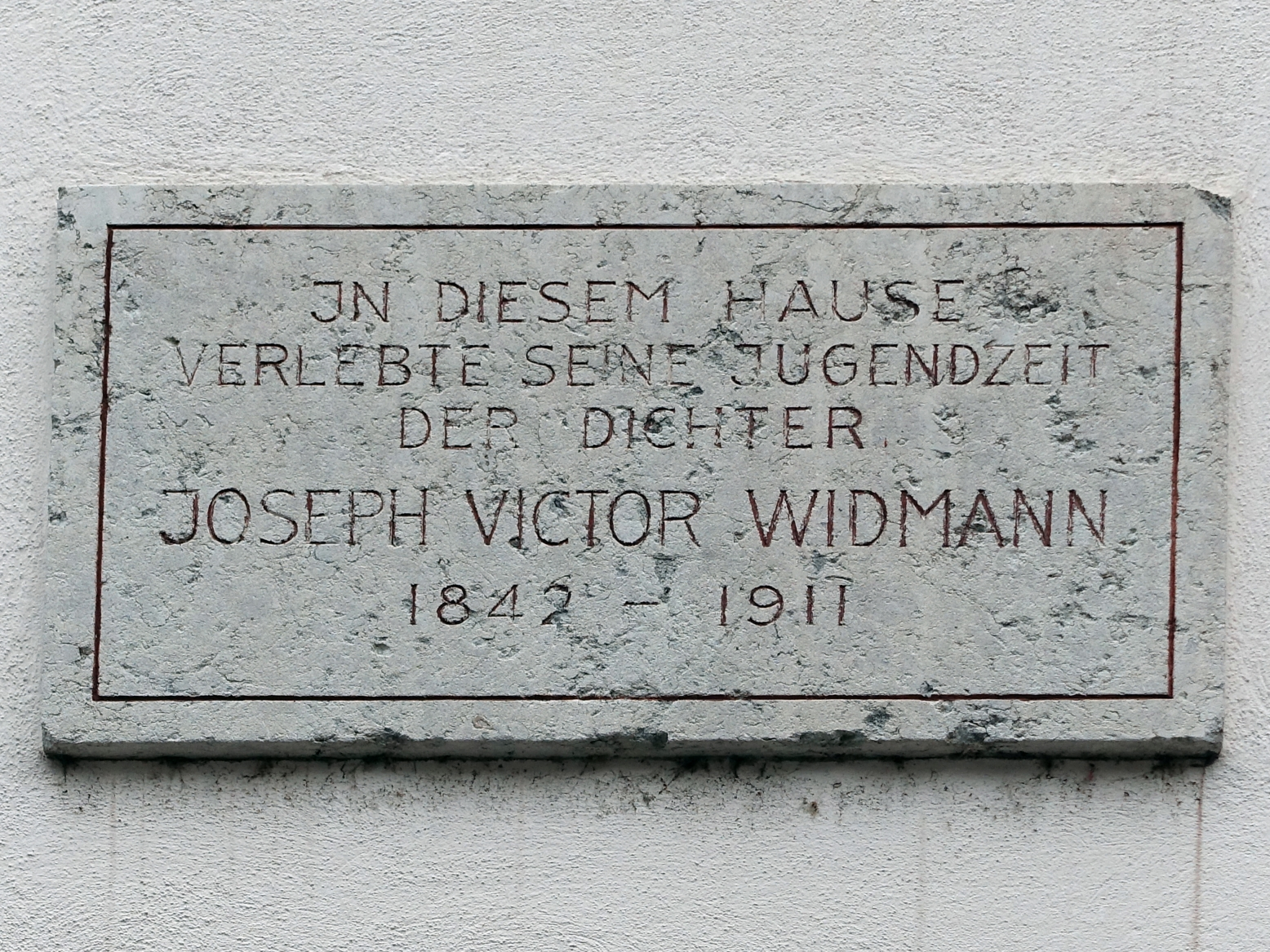 Joseph Victor Widmann (1842–1911) Schriftsteller, Redakteur, Feuilletonist, Literaturkritiker und Journalist. Wohnhaus an der Kanonengasse 1, 4410 Liestal, Schweiz. Inschrift über der Tür: In diesem Hause verlebte seine Jugendzeit der Dichter